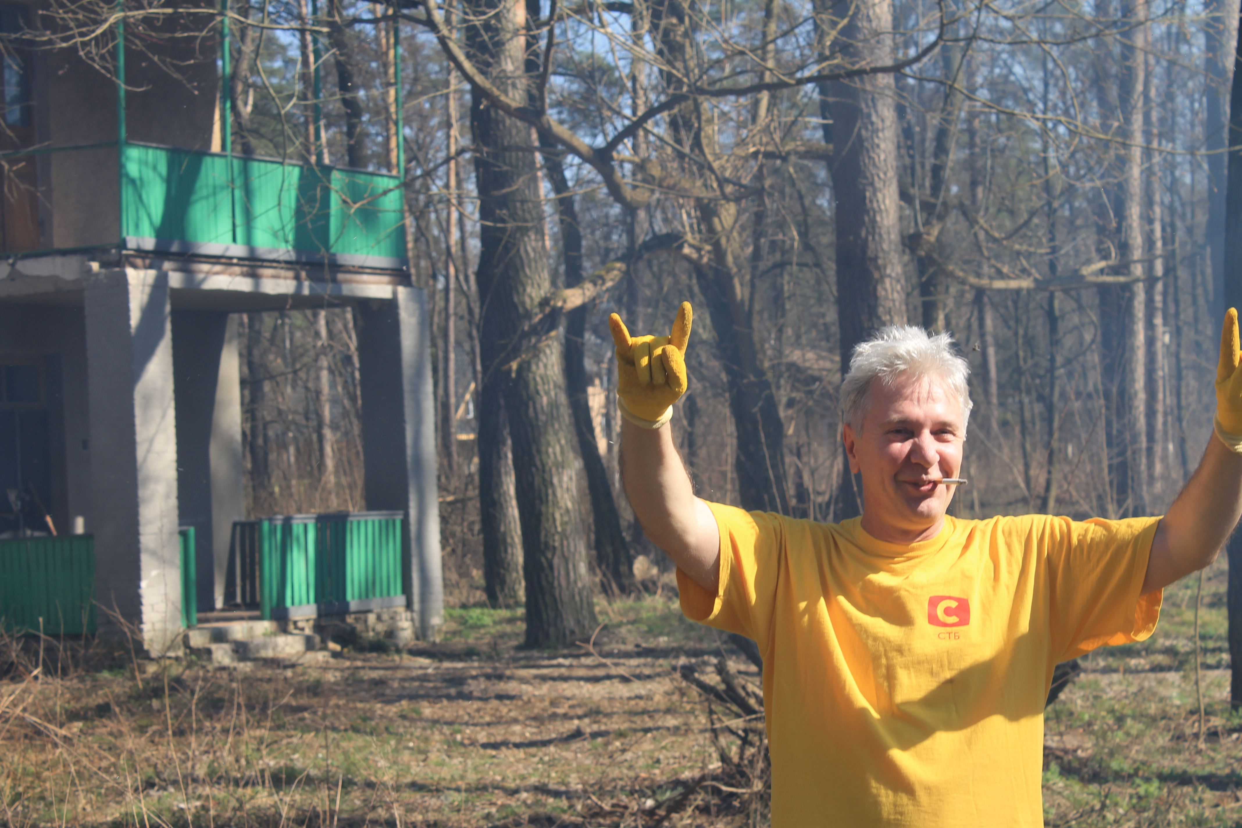 Композитори на суботнику - Сергій Пілютіков